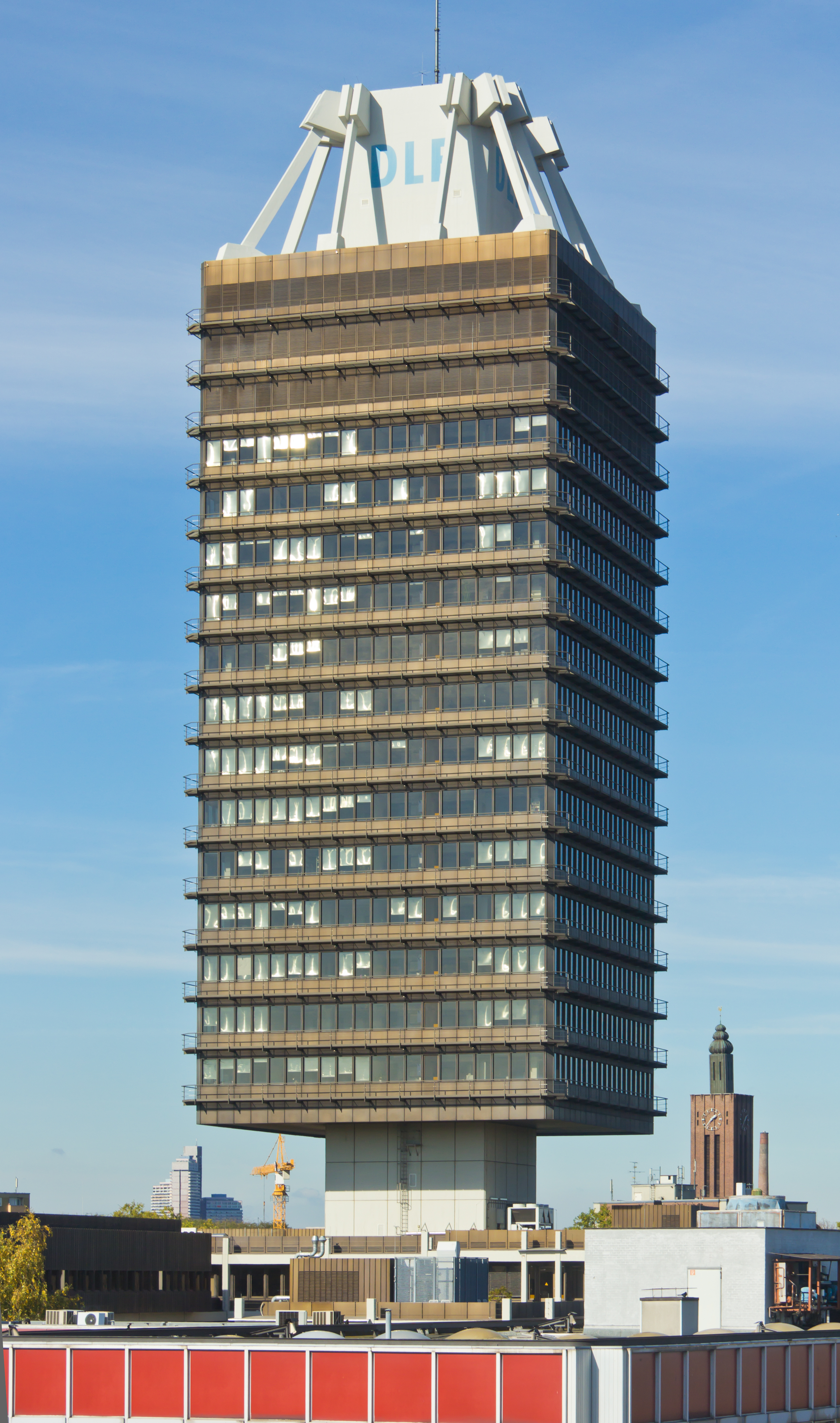 Funkhaus des Deutschlandfunks in Köln. Architekt: Gerhard Weber, Baujahr: 1974-78, Bauherr: Bundesbaudirektion